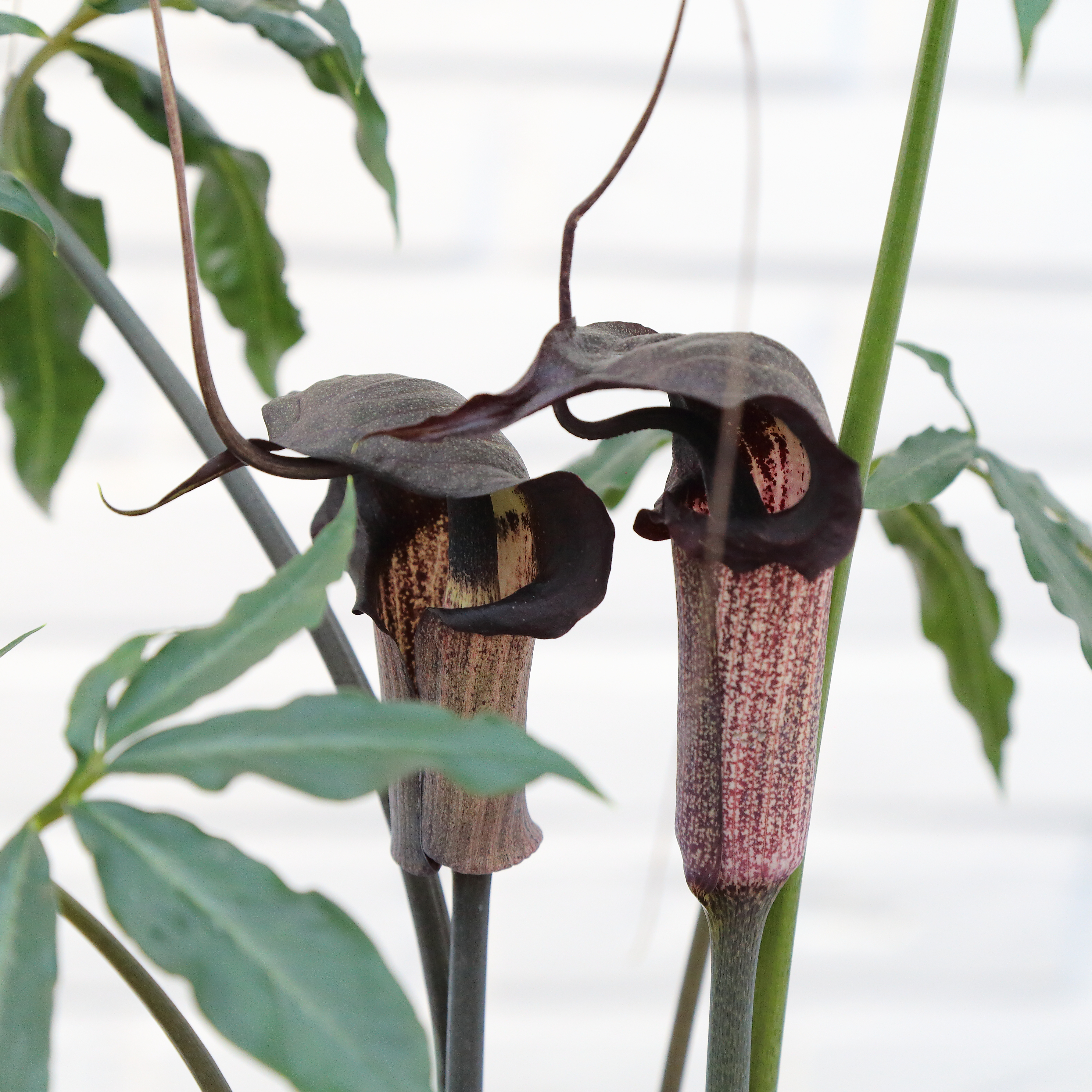 Arisaema thunbergii ssp. urashima identifierad med hjälp av skylt i Göteborgs botaniska trädgård.